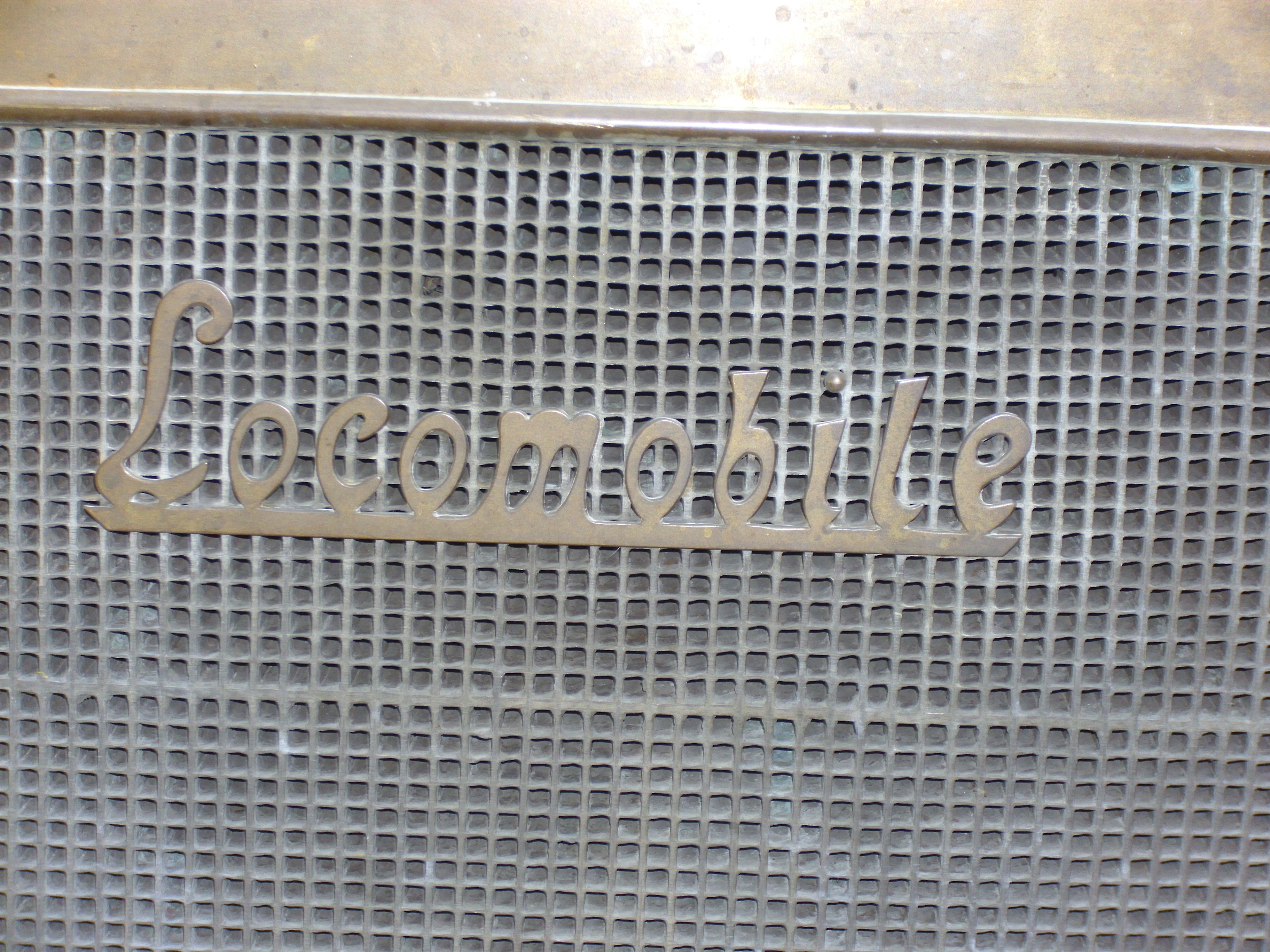 Emblem Locomobile